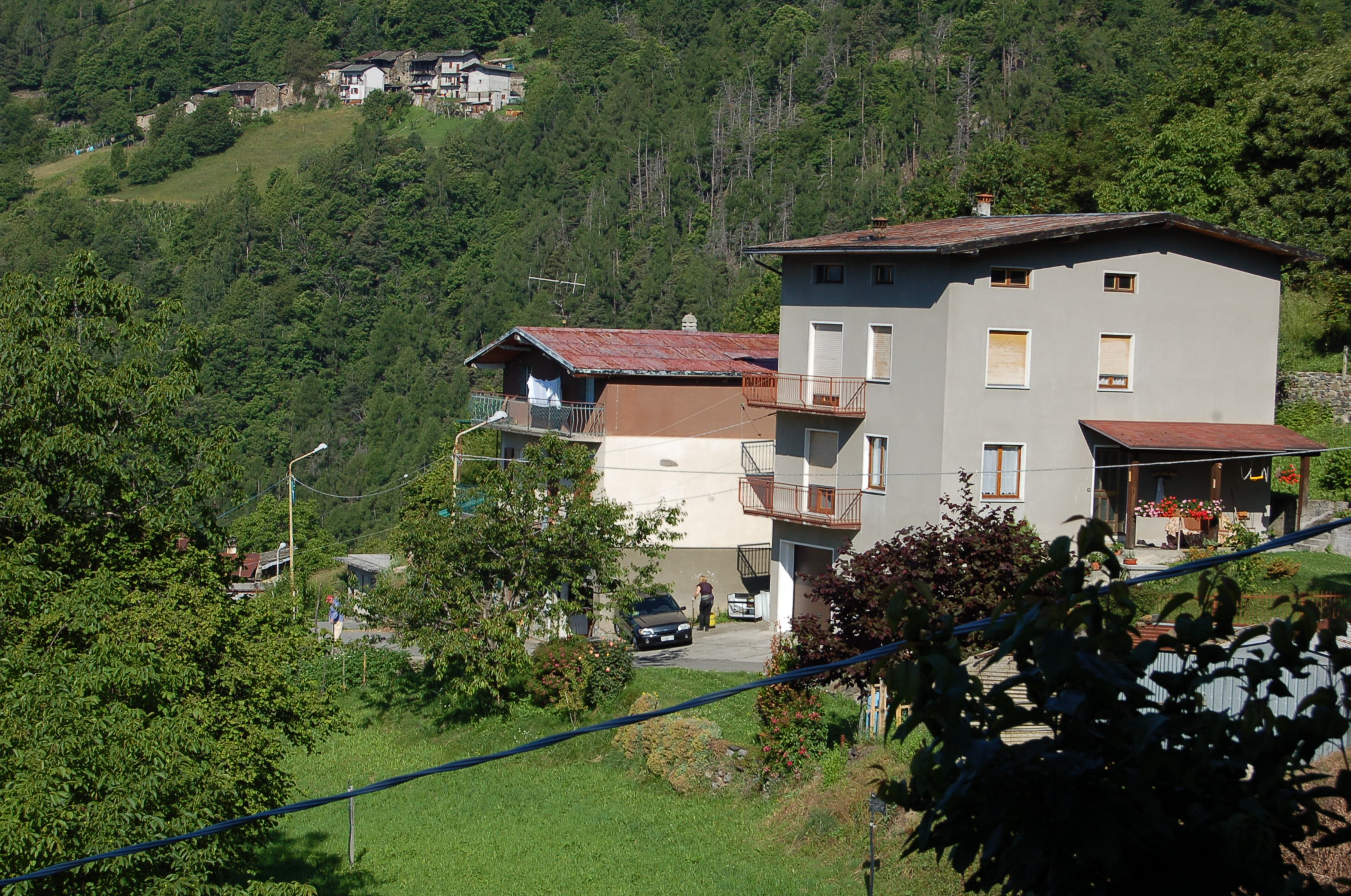 Scorcio della contrada Mocchioni a Baruffini Fraz. di Tirano Prov. di Sondrio